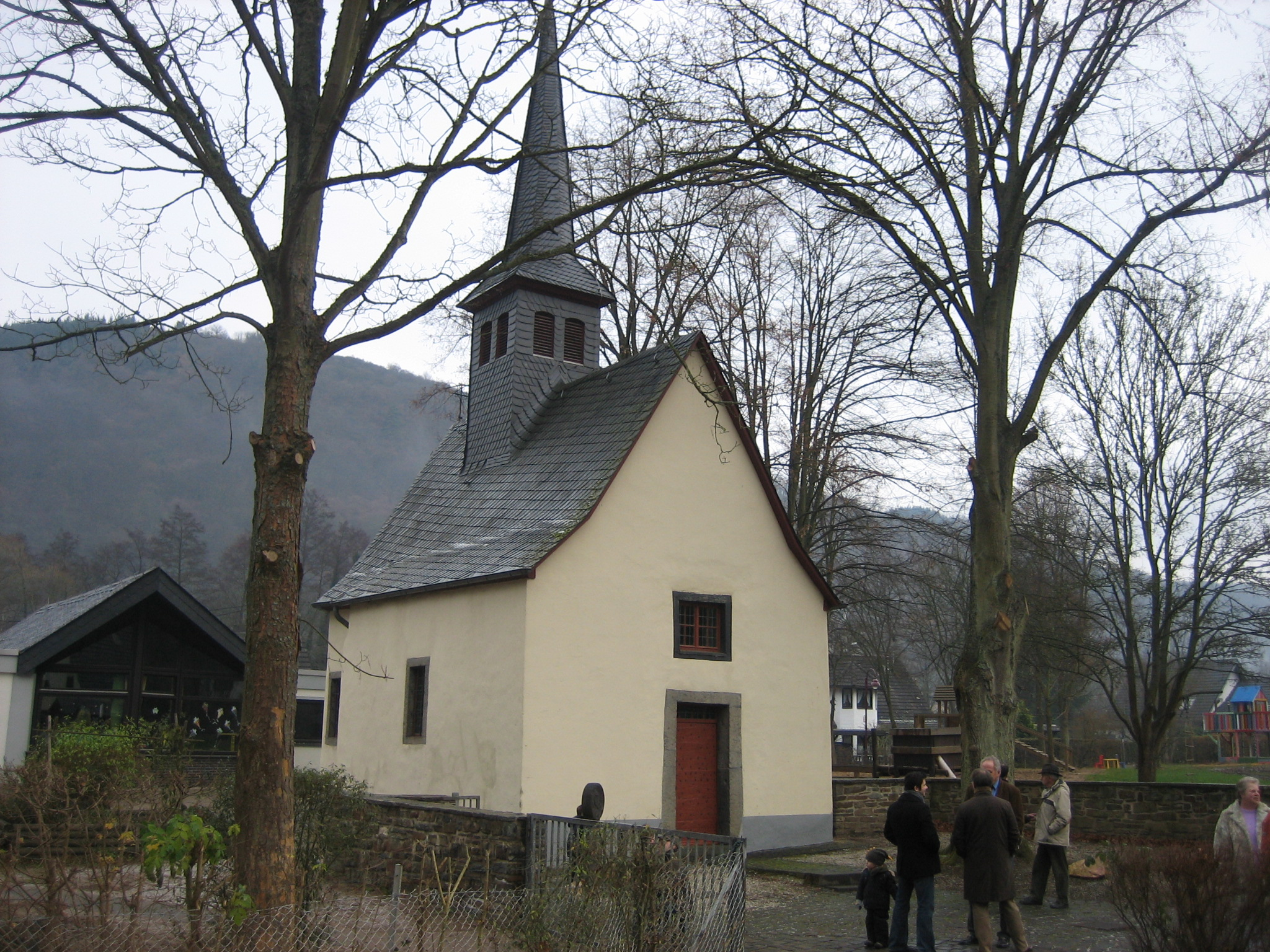 Rochuskapelle